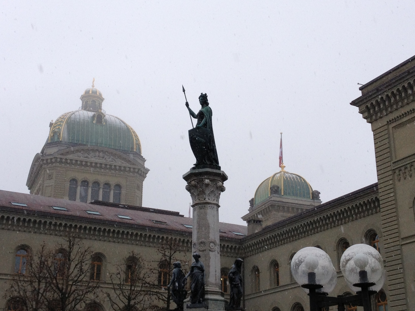 Allégorie représentant Berna (Berne). Fontaine devant l'aile Ouest (historique) du Palais fédéral à Berne, Bundesgasse.